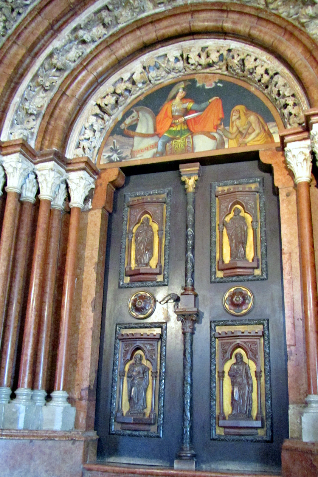 Bencés főapátsági templom (Pannonhalma, Várkerület 1 .) This is a photo of a monument in Hungary. Identifier: 4640